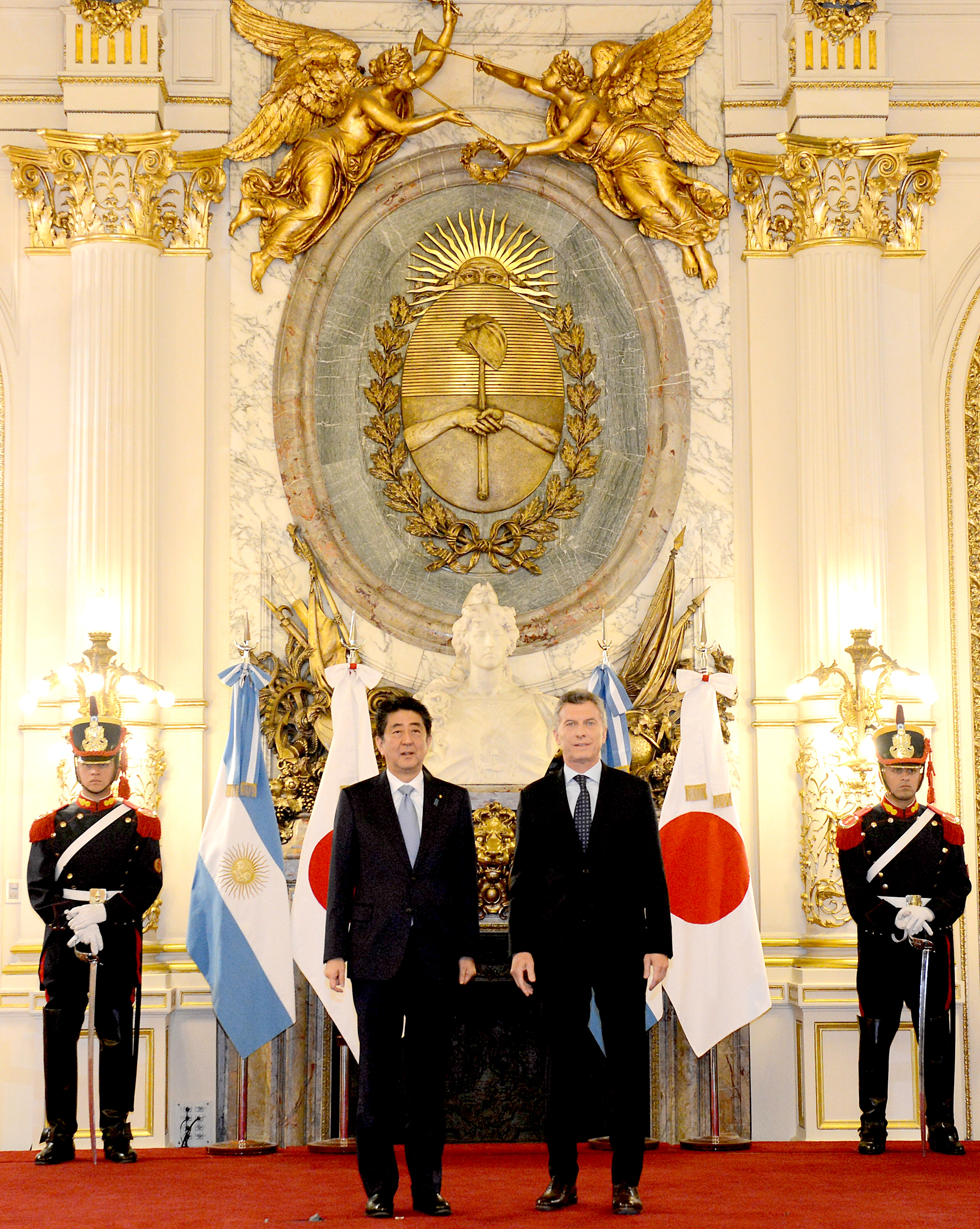 El presidente Mauricio Macri y el primer ministro Shinzo Abe abogaron en favor de construir "una alianza estratégica" entre la Argentina y Japón y se comprometieron a intensificar y a profundizar la relación bilateral, el intercambio comercial y el clima de inversiones.